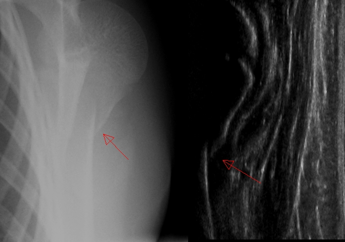 Vergleich Röntgen / Sonographie; subcapitale Humerusfraktur